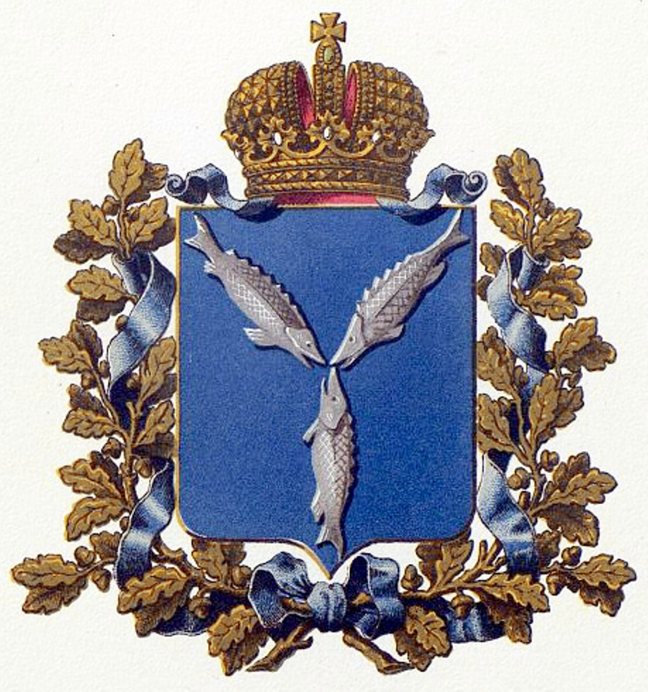 Official Russian Empire coat of arms Saratov Governorate. Герб Российской Империи Саратовской губернии в Гербовнике МВД. Утверждён Императором Всероссийским Александром Вторым.